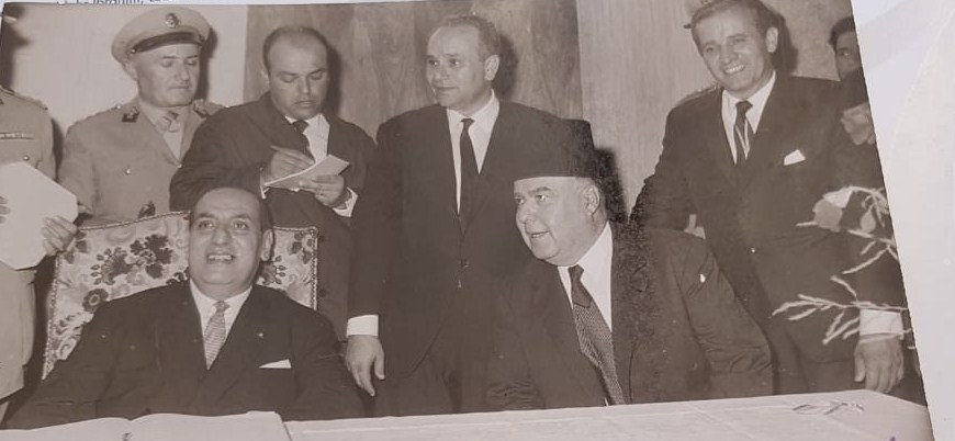 Boutros Khoury avec le President Charles Helou